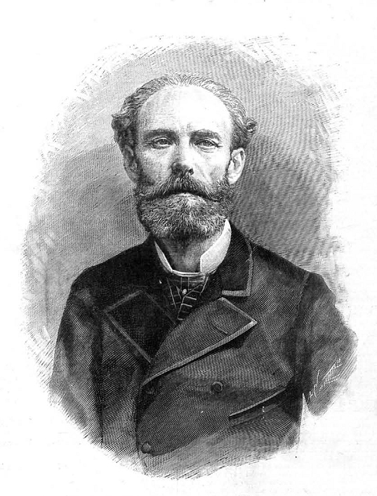 Retrato de José Casado del Alisal, grabado publicado en la revista española La Ilustración Española y Americana.